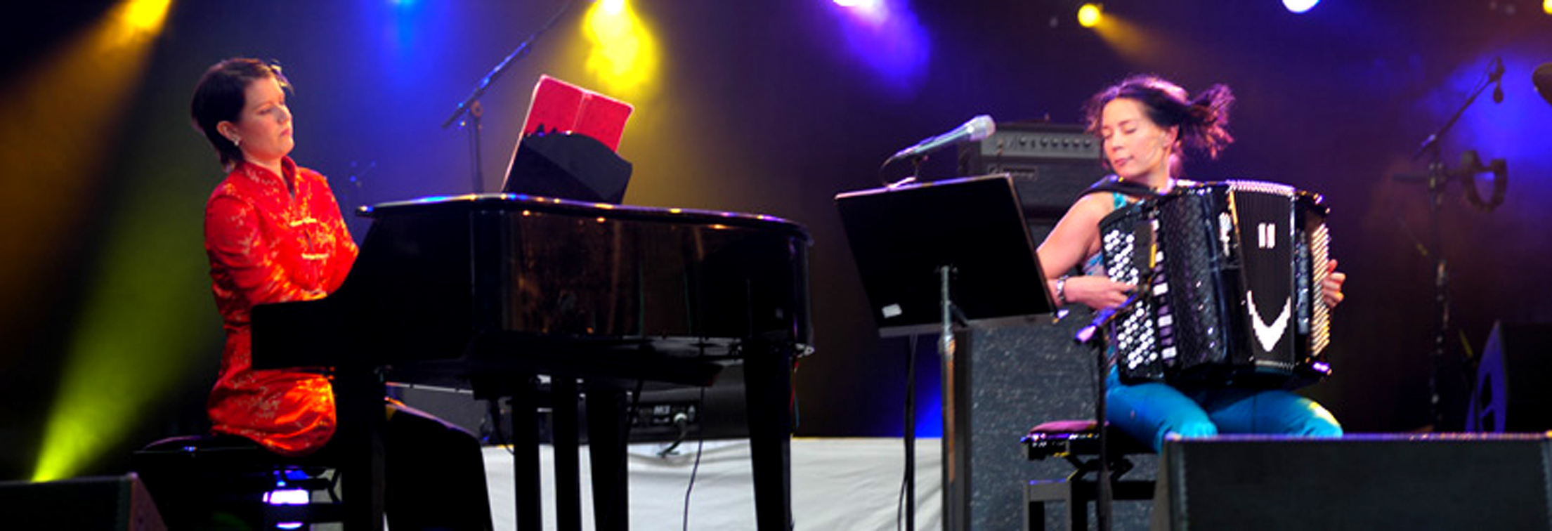 Duo Milla Viljamaa & Johanna Juhola